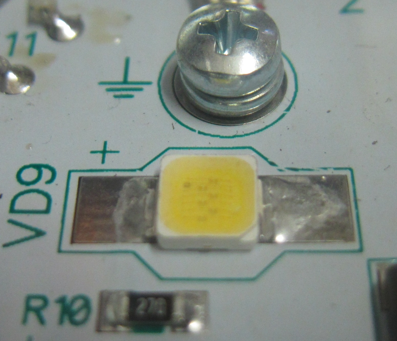 Белый светодиод - элемент плафона типа ППВ02